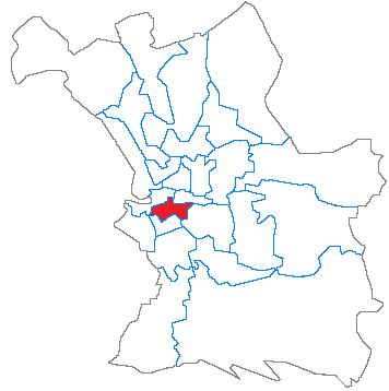 Situation du canton dans la ville de Marseille